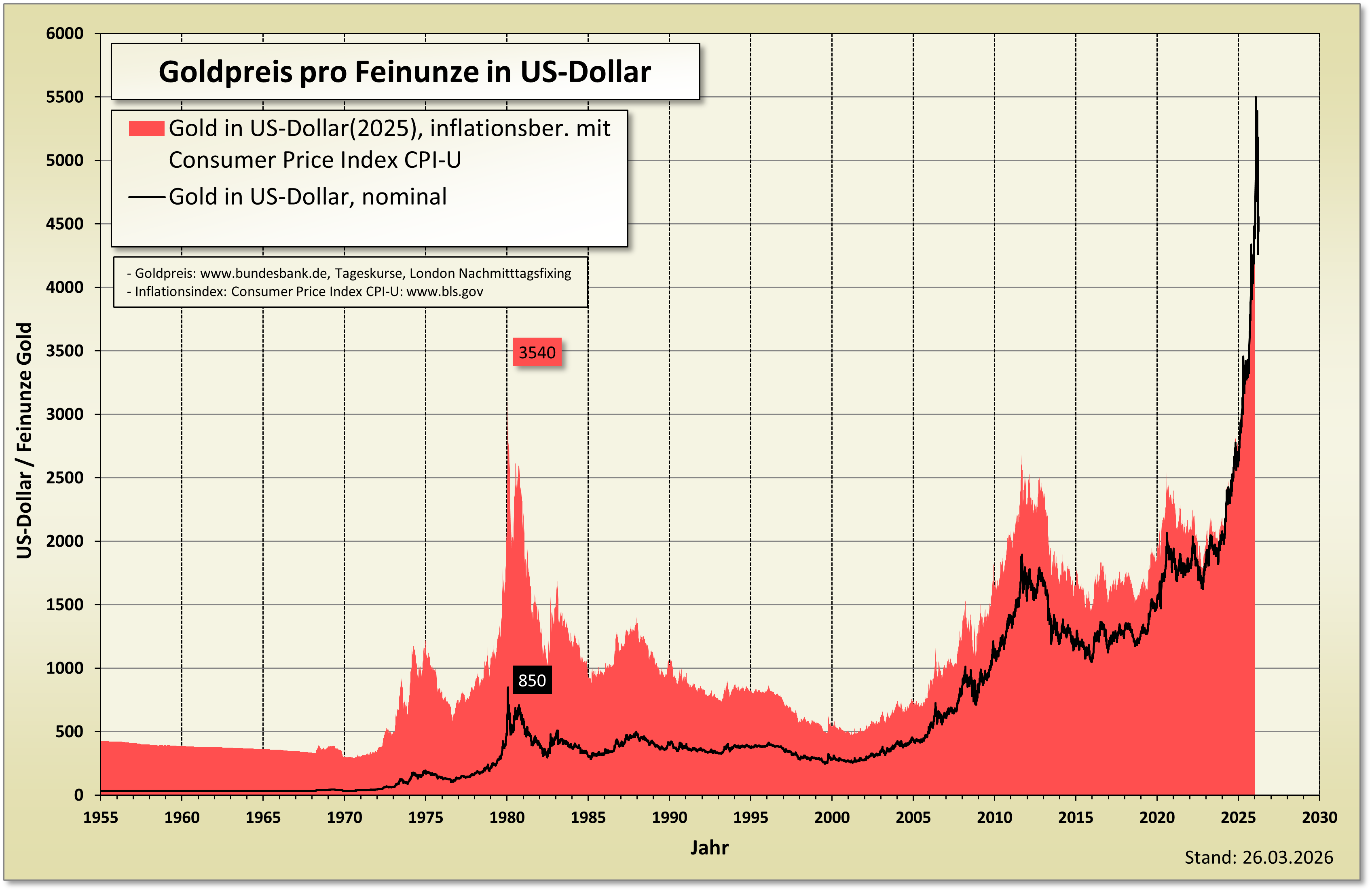 Historischer Goldpreis in US-Dollar, sowie inflationsbereinigter Goldpreis in US-Dollar